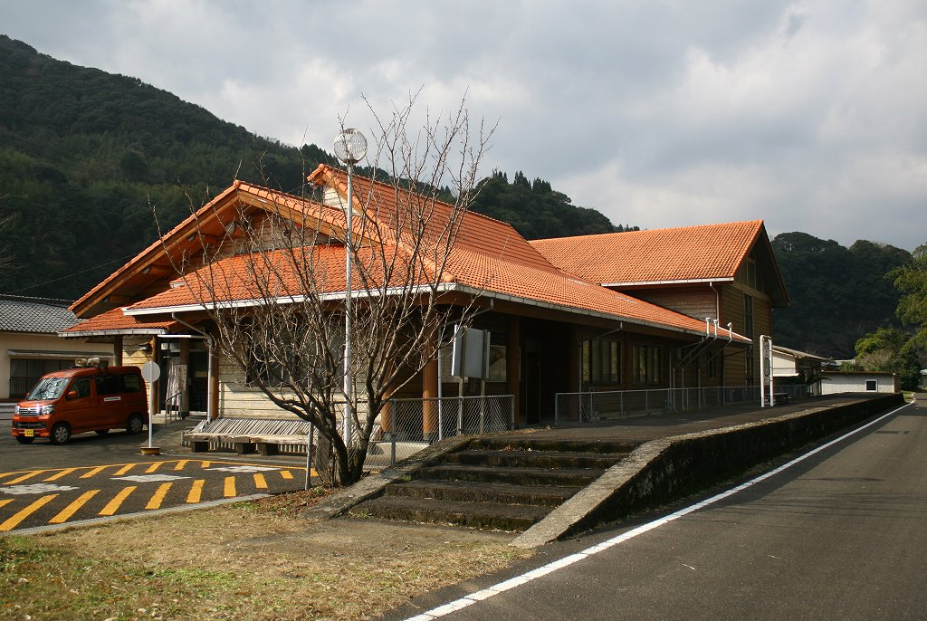 高千穂鉄道日向八戸駅